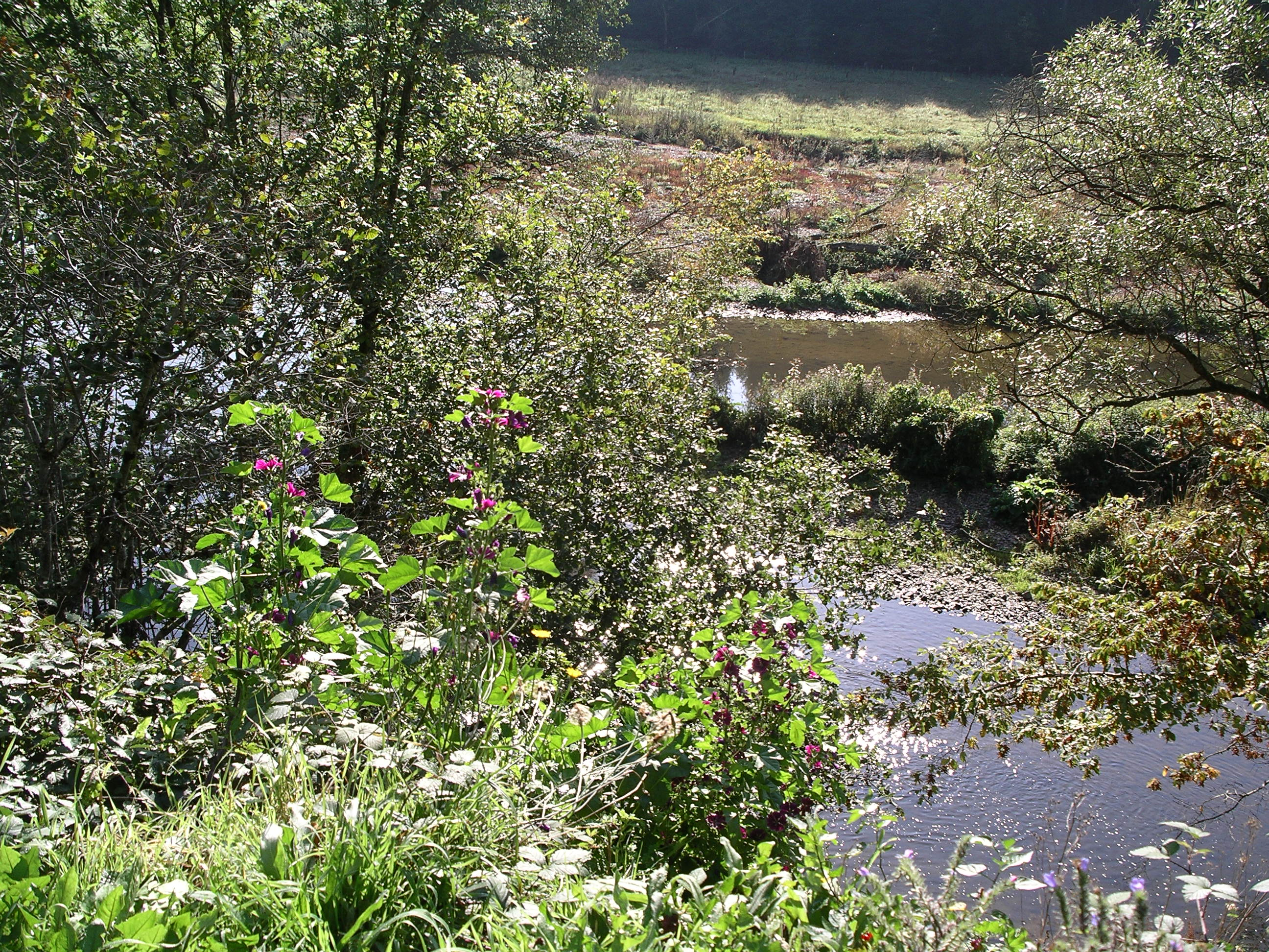 Die Our beim Kohnenhaff, zwischen Rodershausen (Ortsteil der luxemburgischen Gemeinde Hosingen) und Obereisenbach, vom Luxemburger Ufer aus gesehen